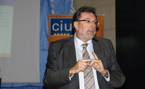 Josep lluís Cleries en míting nova web